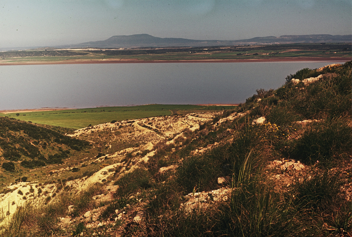 Sebkha d'Arzew en 1975. A l'arrière plan et à droite, en bordure du lac : Djebel el Hallouf. Au fond de l'image (à une quinzaine de km du lac) : Djebel Khar ou Montagne des lions.